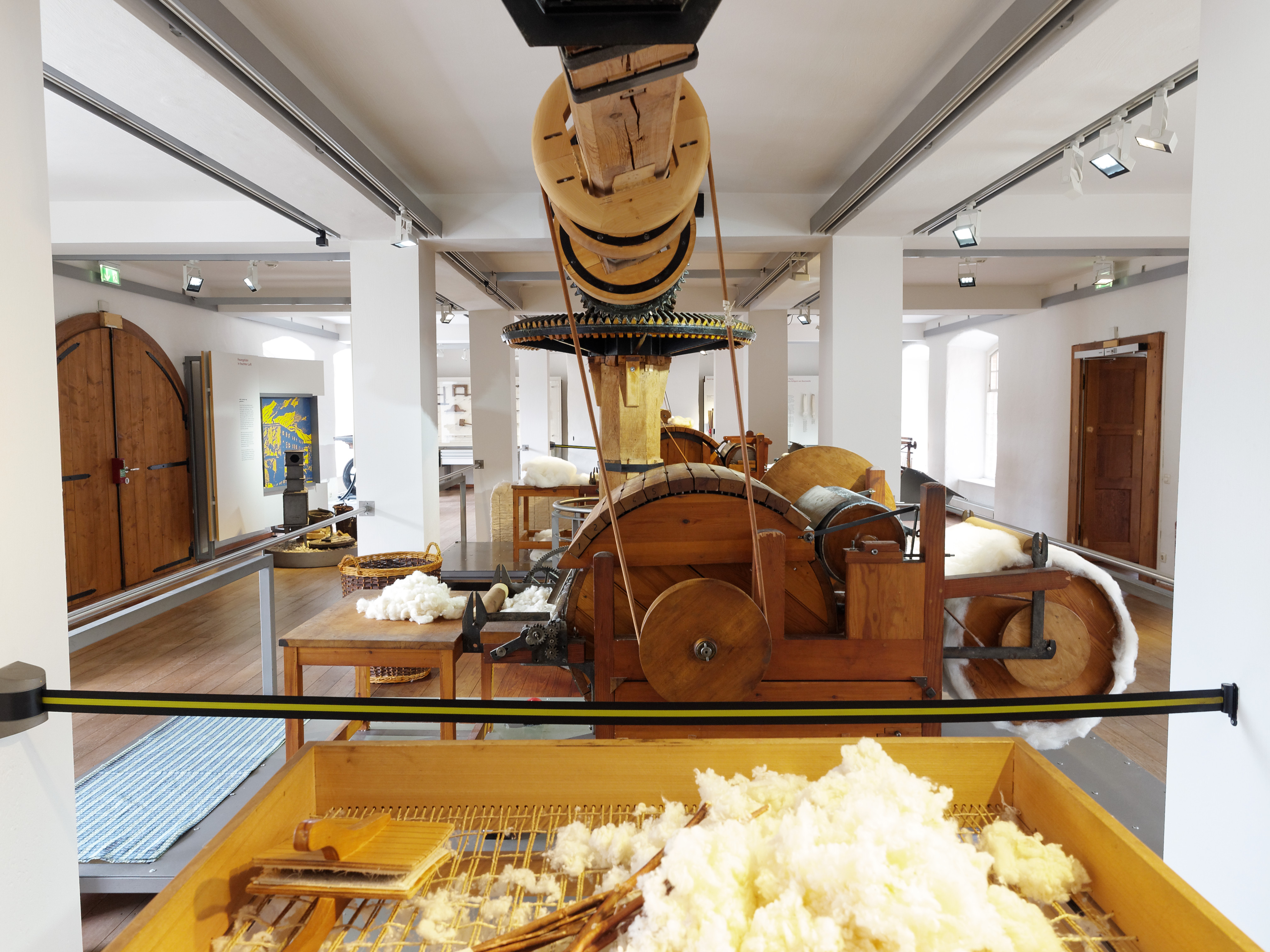 Vorbereitung von Baumwollfasern für das frühe maschinelle Spinnen, fotografiert im Textilmuseum Cromford in Ratingen